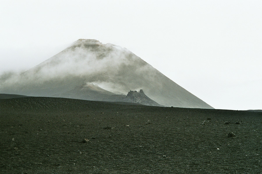 Mount Etna (Aetna)